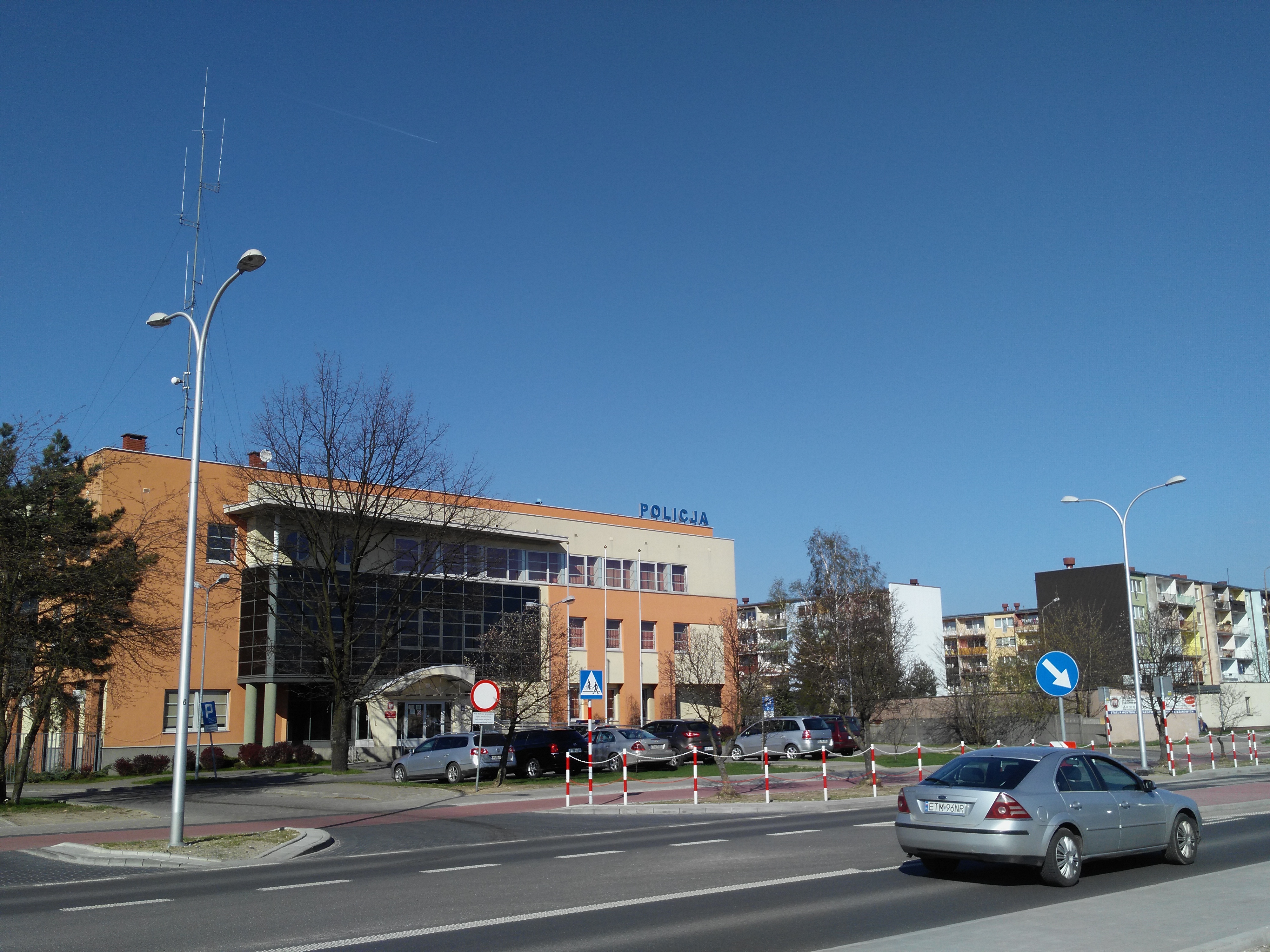 Komenda Policji w Tomaszowie po dekomunizacji ulicy Oskara Langego przy ulicy Wandy Panfil